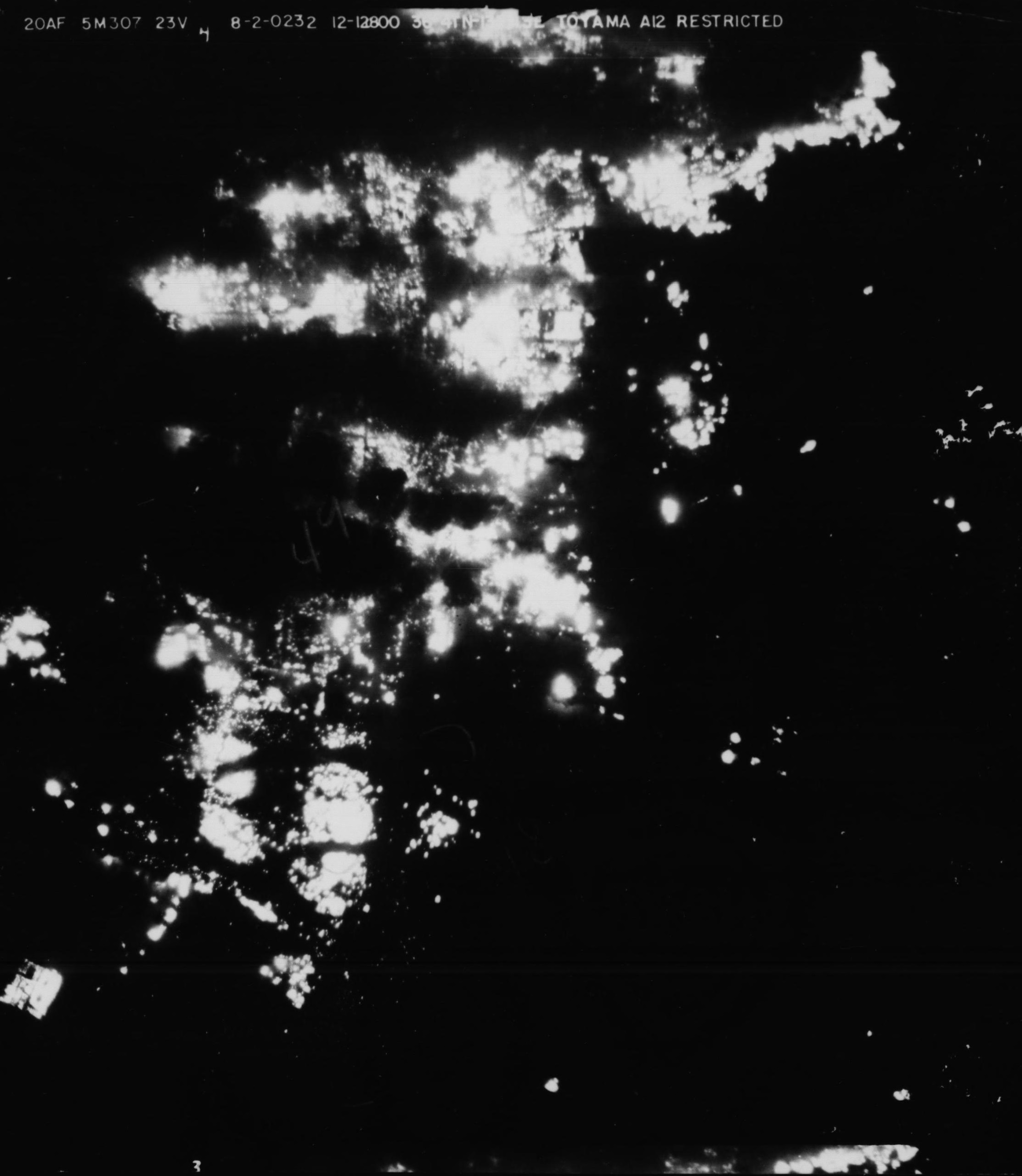 空襲中の富山市